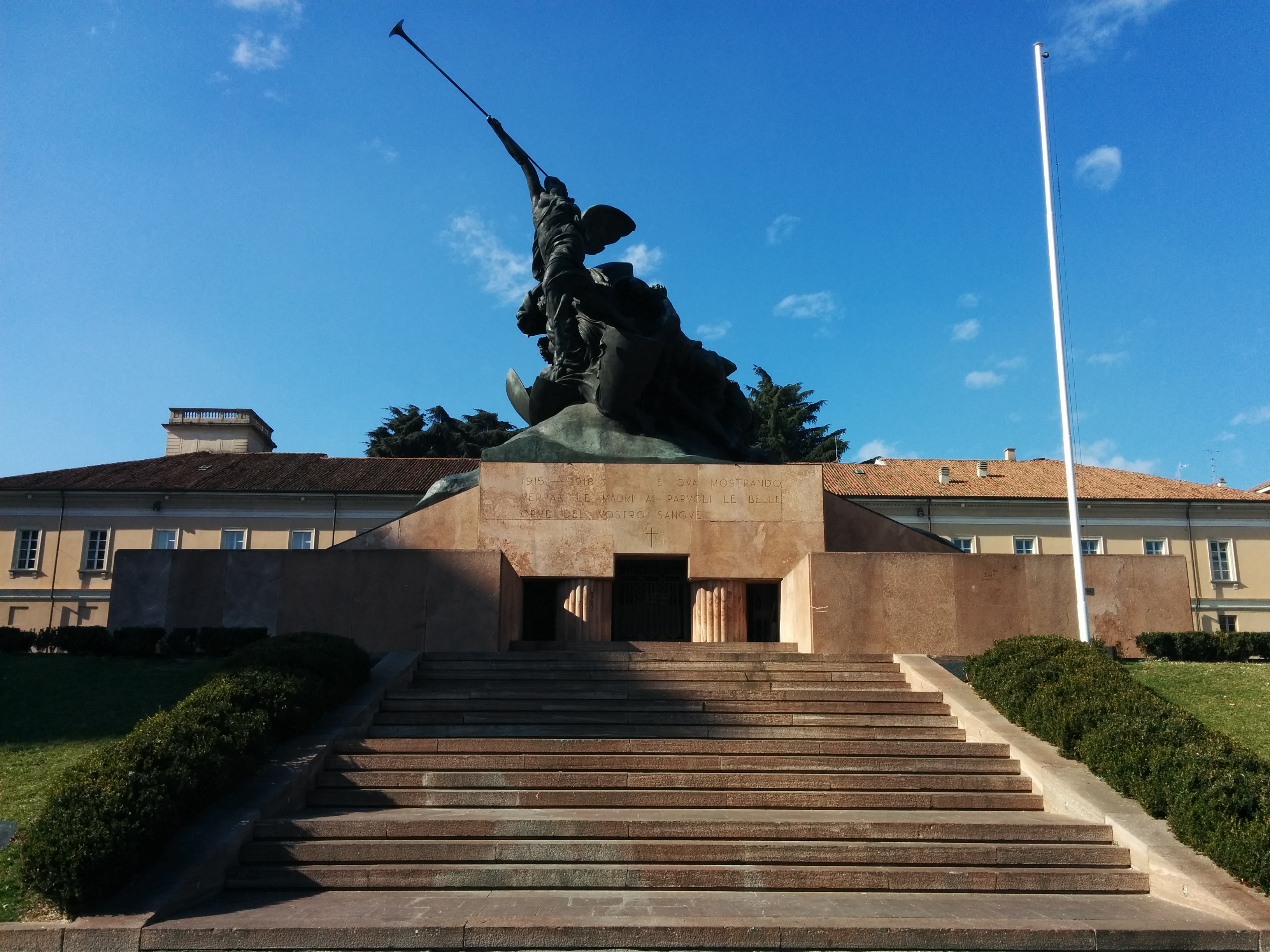 Monumento